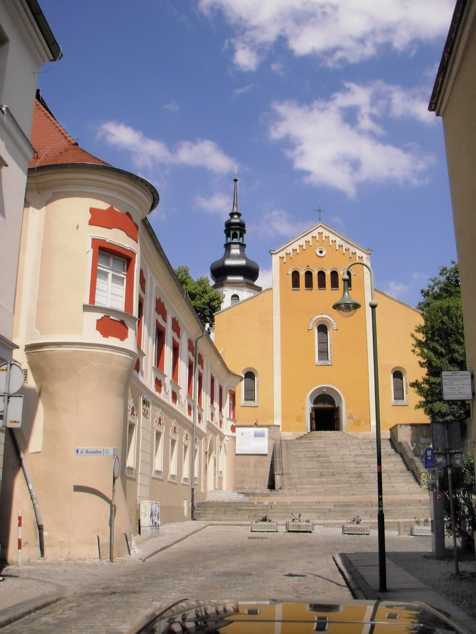 Opole, kościół, ob. par. p.w. Matki Boskiej Bolesnej, poł.XIV, 1701-1708, 1931-1938